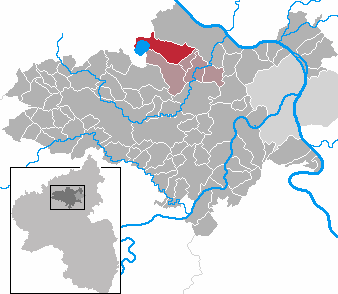 Nickenich in Rhineland-Palatinate - district Mayen-Koblenz